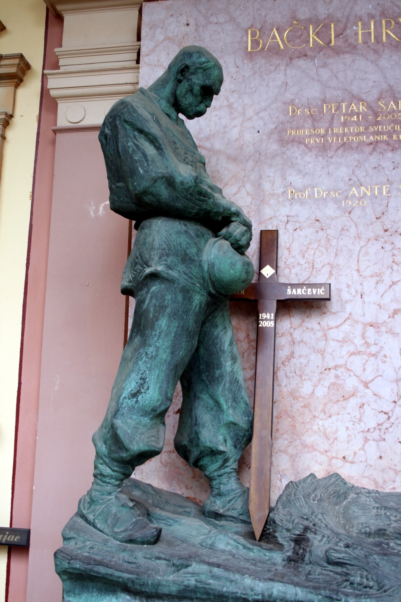 Spomenik Roberta Frangeša Mihanovića, Bački Hrvati, grob Petra Šarćevića (1941.-2005.), profesor i rektor sveučilišta u Rijeci, prvi veleposlanik RH u SAD-u, Mirogoj, Zagreb, Hrvatska